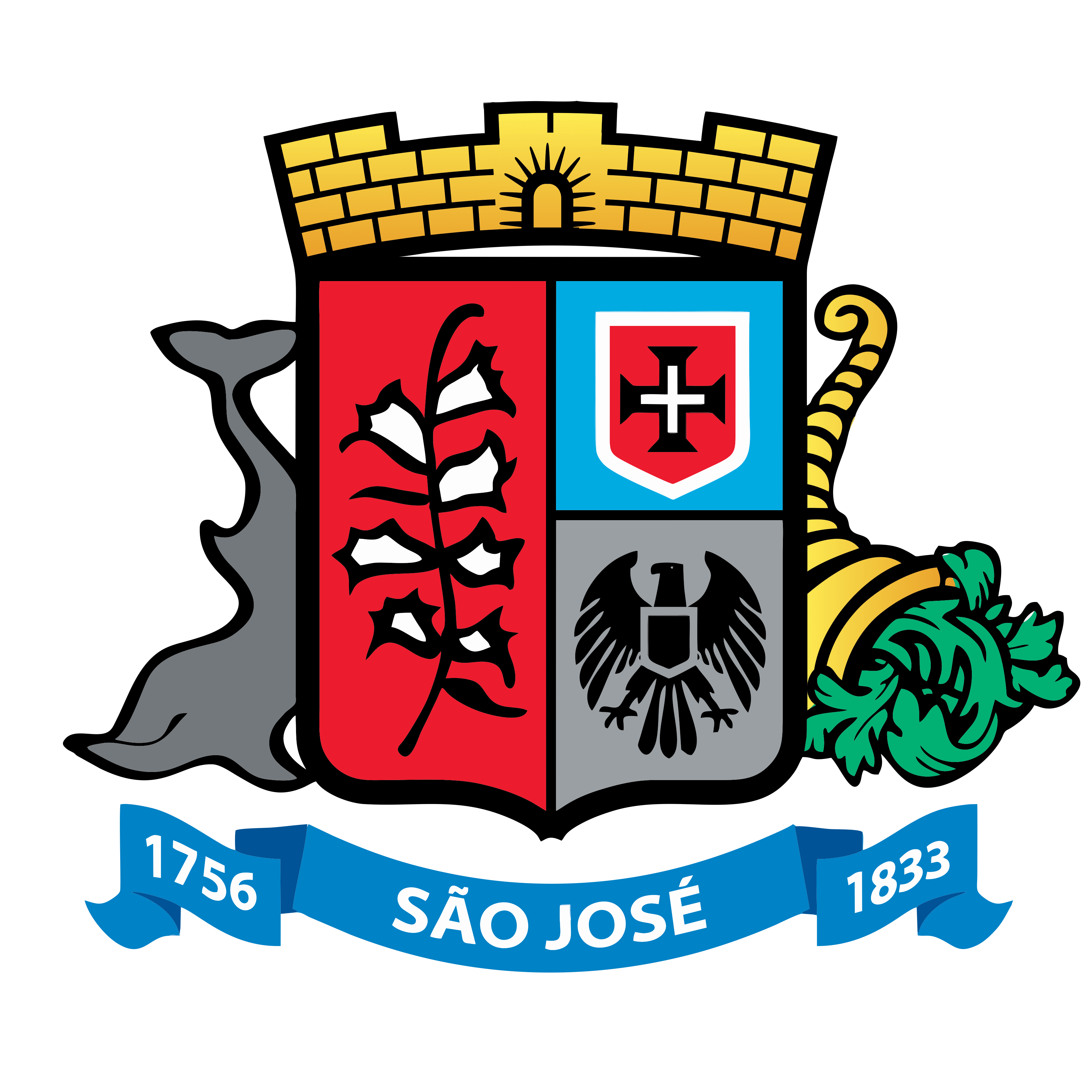 Brasão do município de São José (Santa Catarina), conforme usado pela cidade.